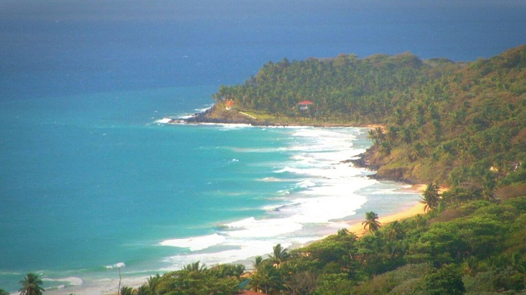 Long Bay, vista desde Mount Plesant.